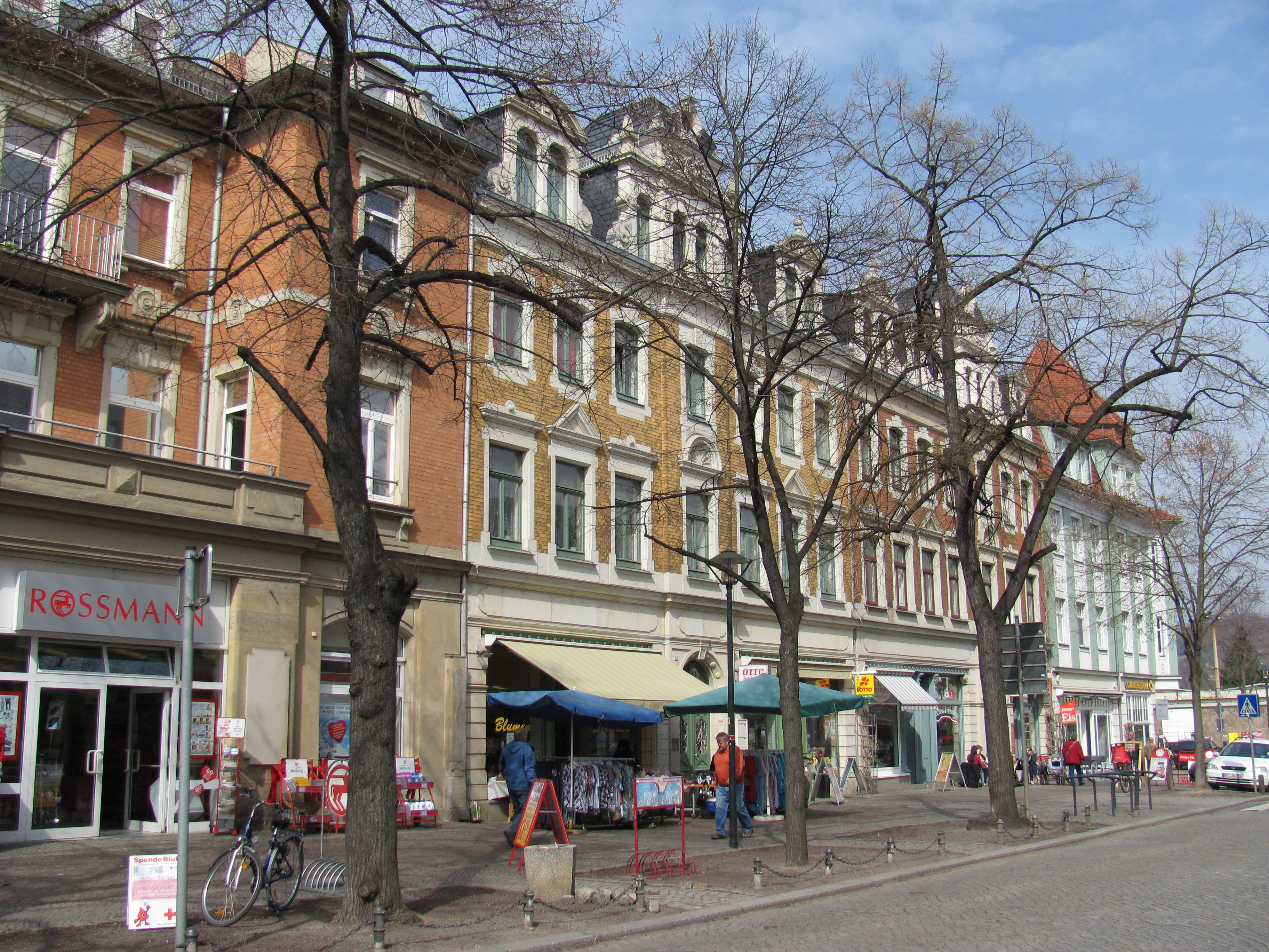 Radebeul Wohn- und Geschäftshaus Bahnhofstraße 8-8a